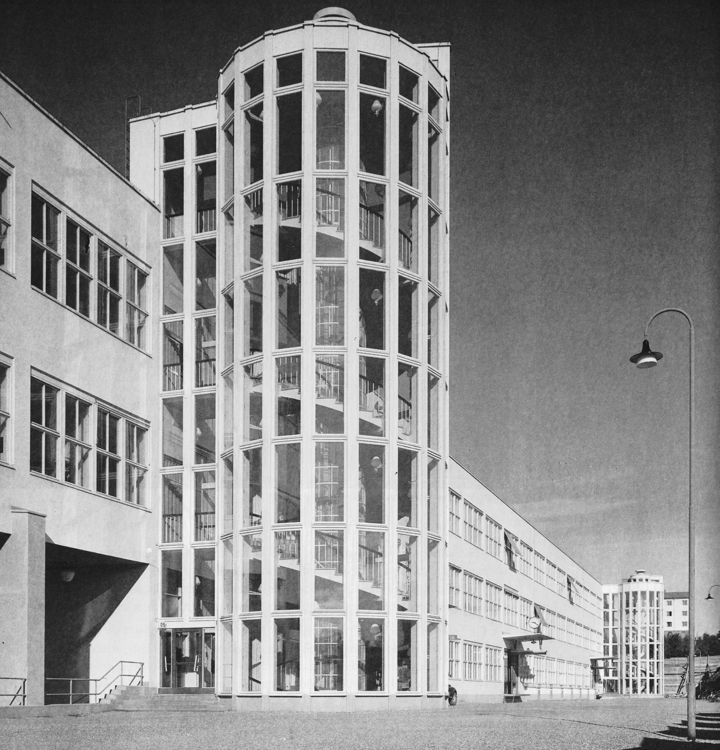 LM Ericssons fabrik i Midsommarkransen, huvudtrappa